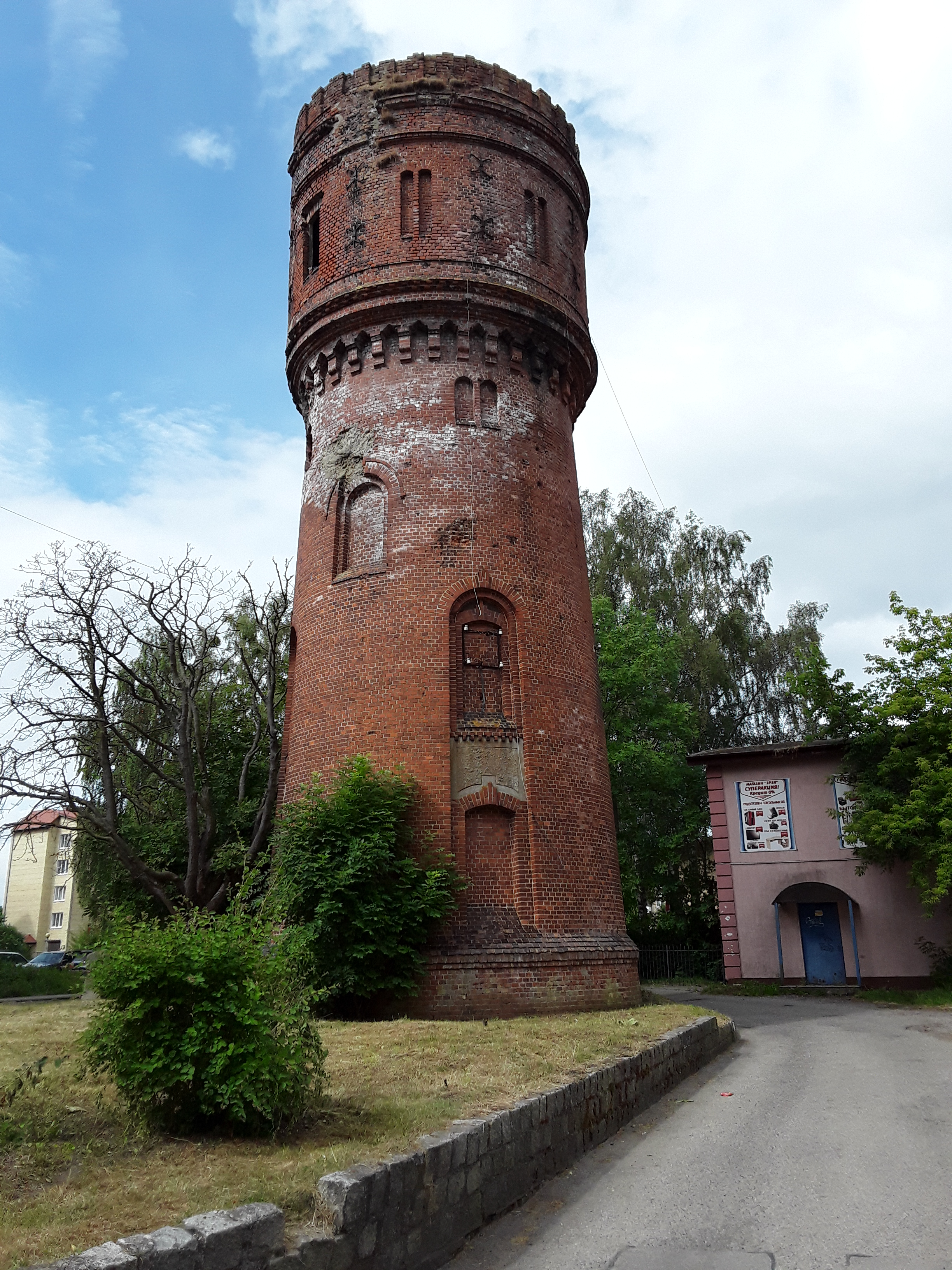 Neues altes Wahrzeichen der Stadt: Der Wasserturm von Heiligenbeil